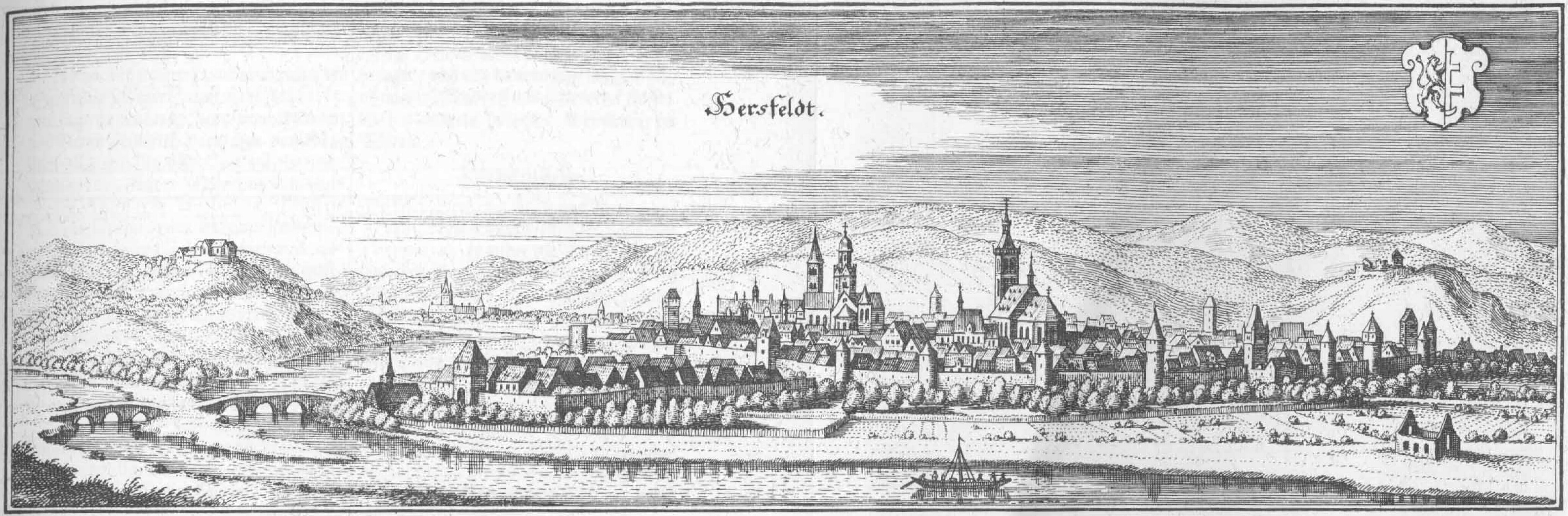 Hersfeld im Jahr 1655, Im Zentrum der Stadt die Stadtkirche, links davon die Klosterkirche mit dem einen Westturm und den Vierungsturm. Links das Peterstor und der davor liegenden Vorstadt mit den Steinbrücken über die Fulda und die Haune. Neben der Fuldabrücke, außerhalb der Stadt das Sondersiechenhaus. Ebenfalls links auf dem Berg die Propstei Johannesberg und darunter, schemenhaft am Horizont im Fuldatal angedeutet, das Schloss Eichhof. Rechts im Bild sieht man das Klaustor, darüber auf dem Frauenberg die Ruinen der dortigen Kirch- und Klosterbauten und darunter am Ufer der Fulda die Ruine der Klauskirche.